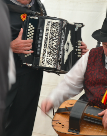 Accordéoniste et vielleux à Grenord, commune de Chabanais (Charente, France).